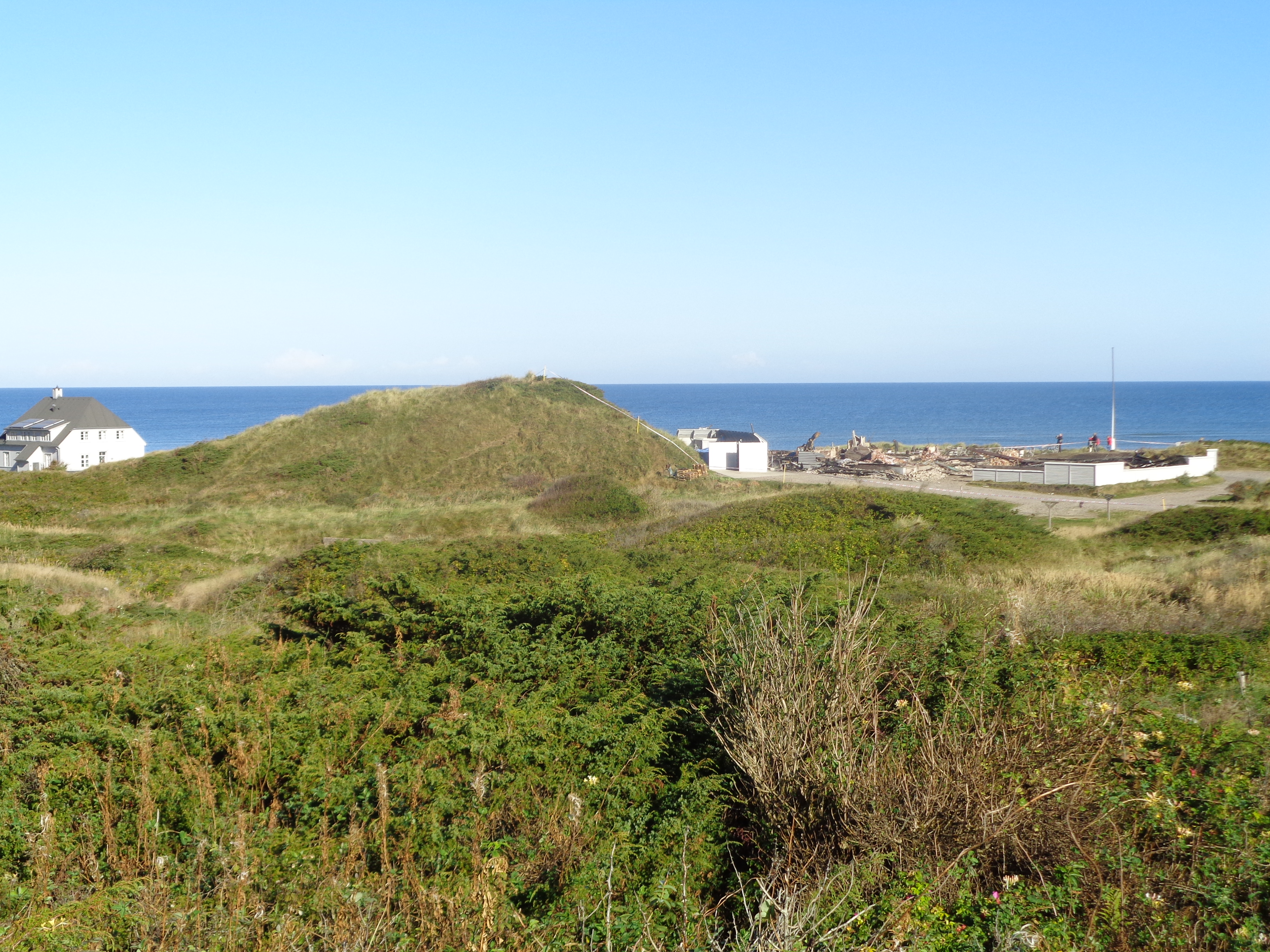 In der Nacht vom 25. auf den 26. September 2016 brannte das Badehotel Svinkløv (rechts) vollständig ab. Das Nachbargebäude (links) blieb unbeschädigt.